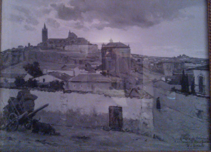 la ciudad ficticia de Orbajosa, descrita por Galdós en su novela Doña Perfecta